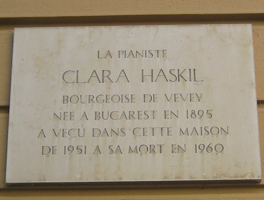 plaque sur la maison de Clara Haskil, Vevey